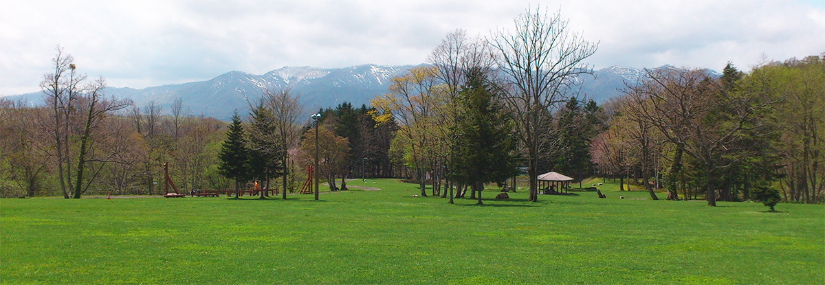 道民の森 神居尻地区より